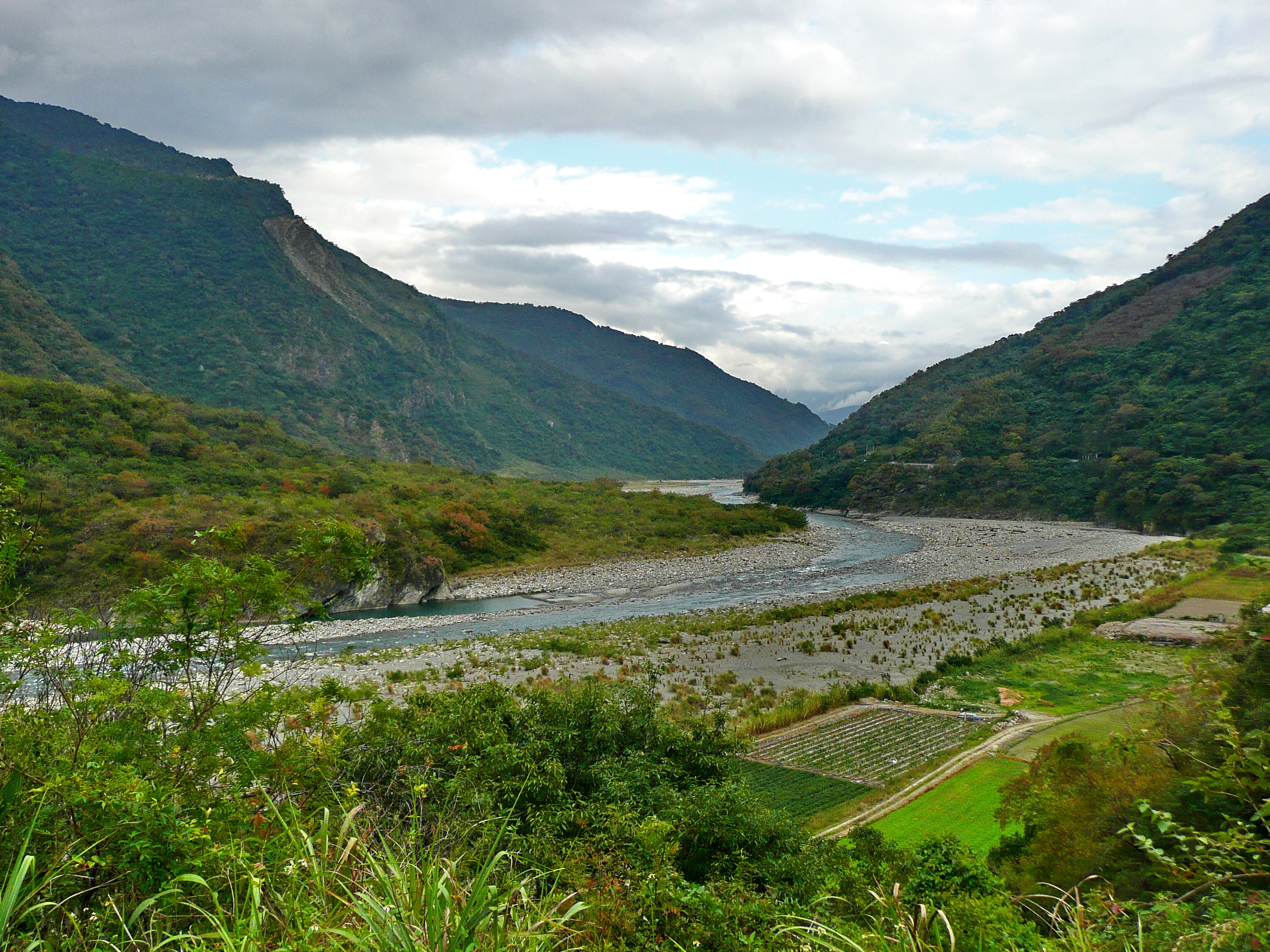 新武呂溪 Xinwulu River